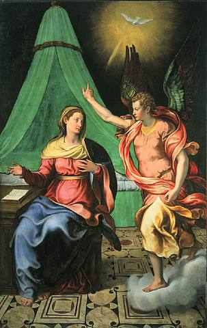 Anunciación